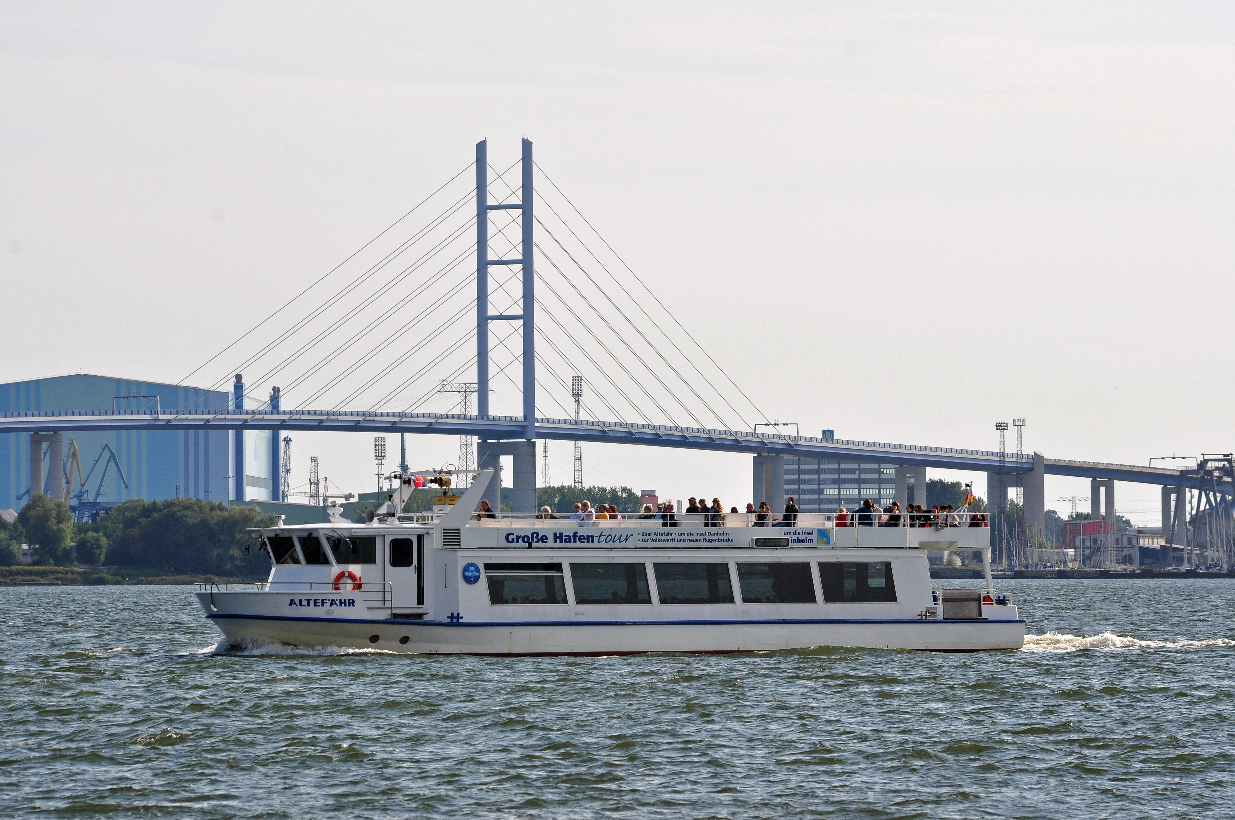 Stralsund von Altefähr aus (2012-09-02), by Klugschnacker in Wikipedia (21)